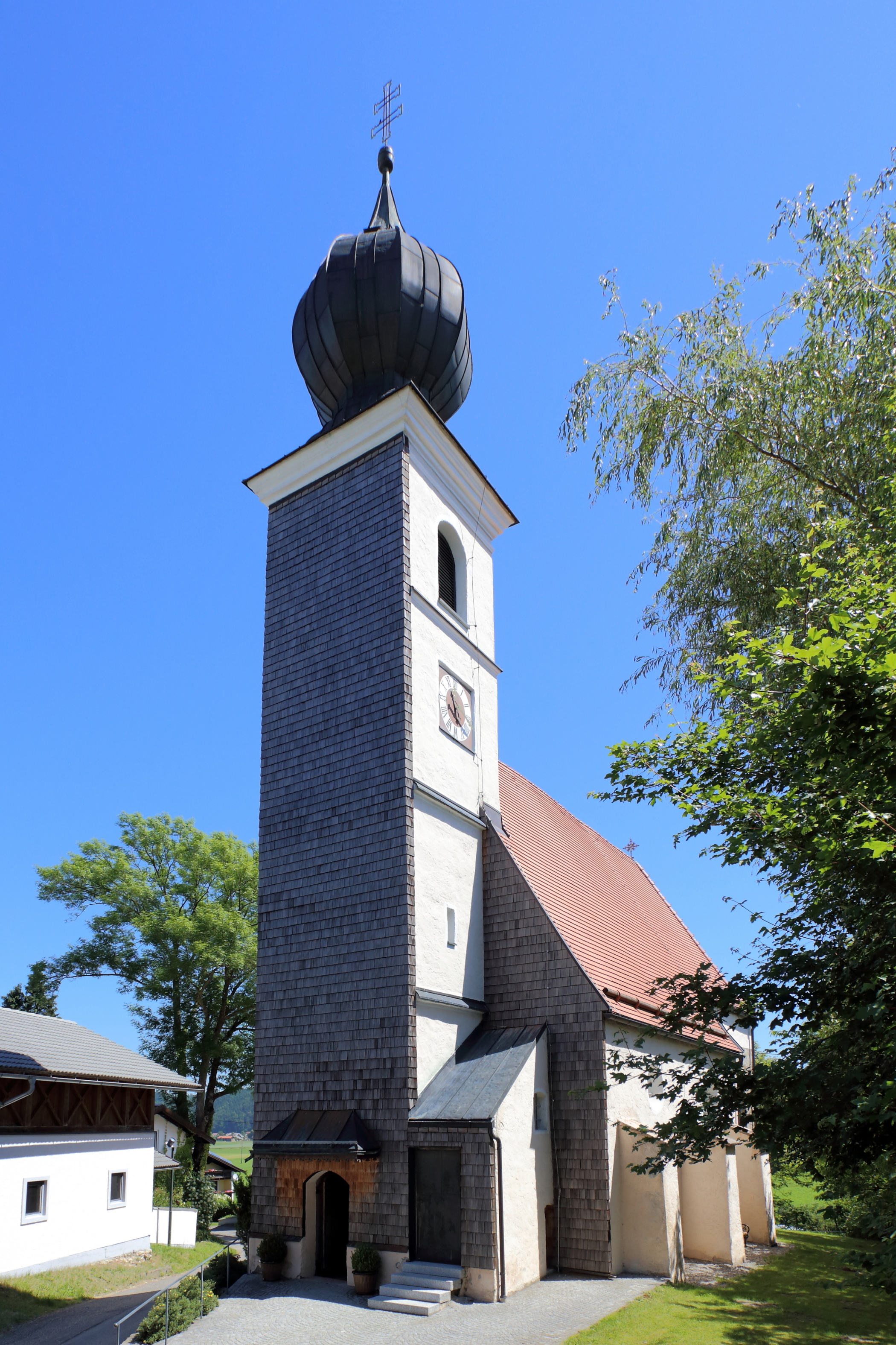 Südwestansicht der katholischen Filialkirche hl. Valentin in Valentinhaft, ein Ortsteil der oberösterreichischen Gemeinde Munderfing. Eine gotische Kirche, die 1459 geweiht wurde.